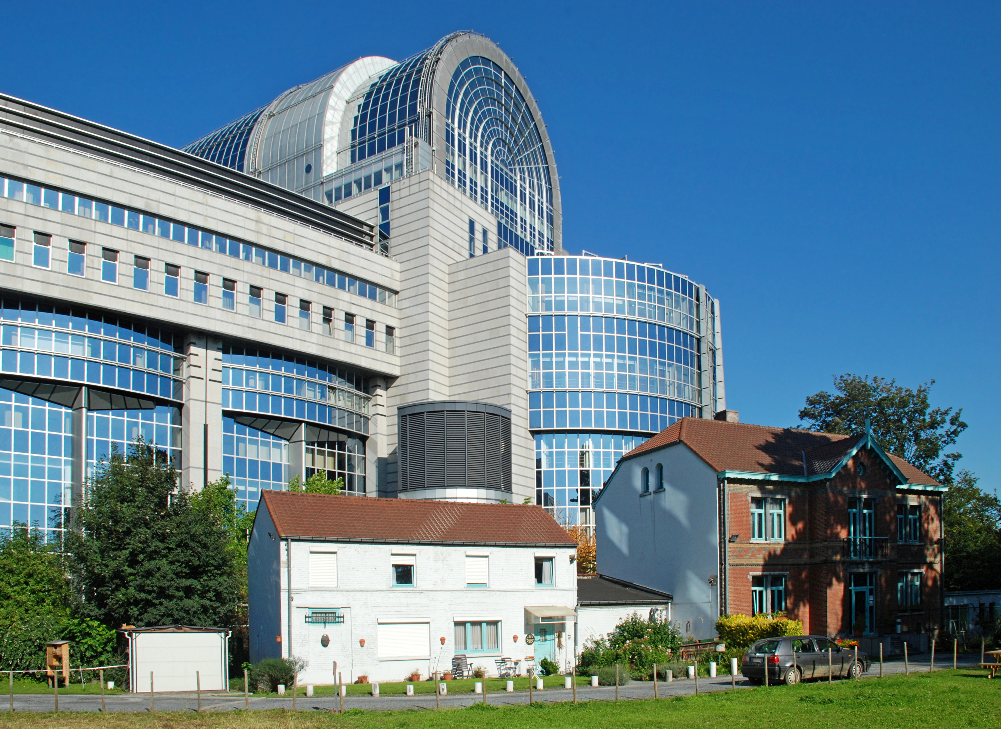 Belgique - Bruxelles - Parlement européen - arrière du bâtiment Paul-Henri Spaak (Architecture postmoderne en Belgique - Atelier d'architecture de Genval - 1987-2004)